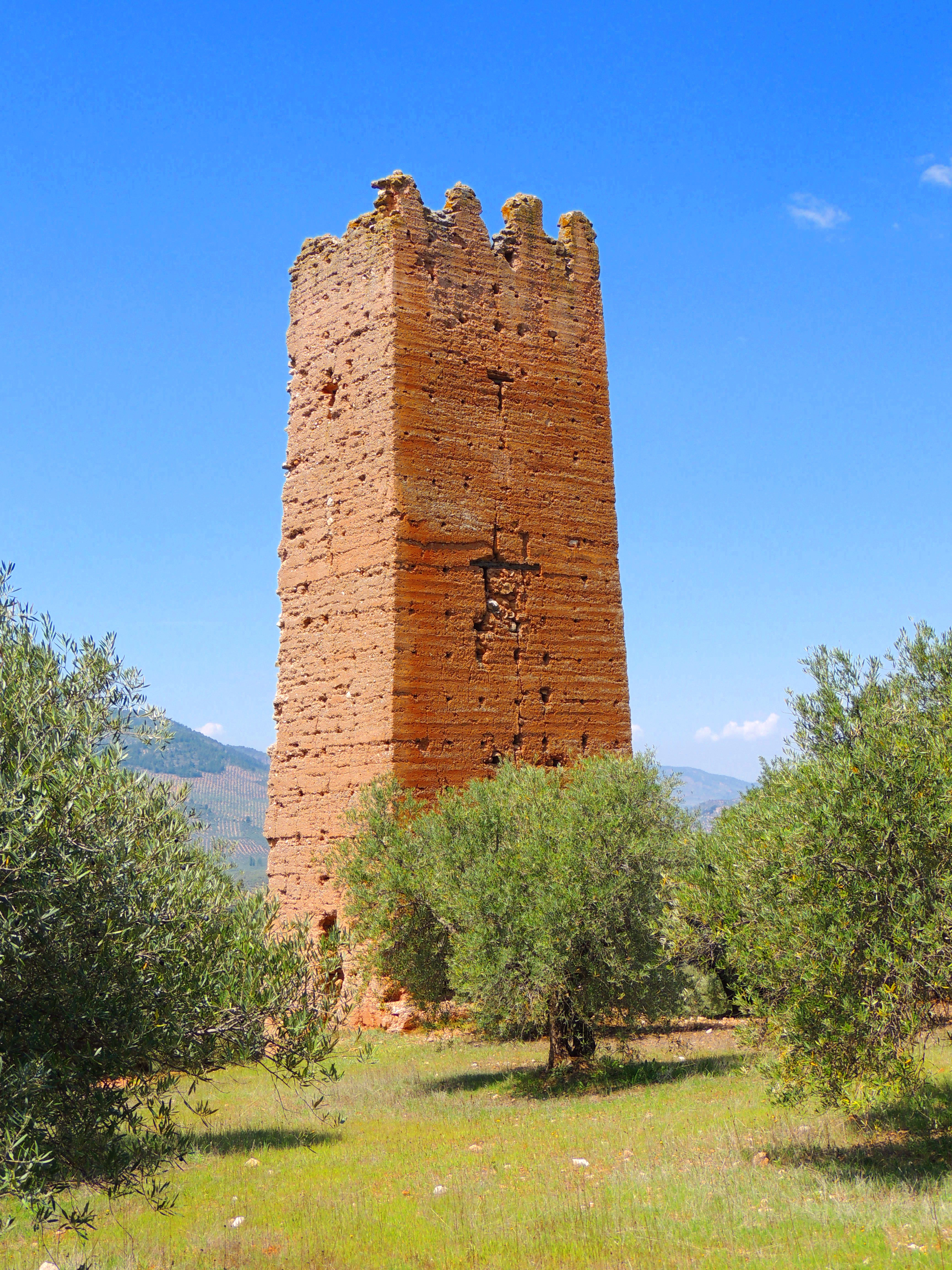 Torre musulmana de Santa Catalina. Siglo XII. Orcera